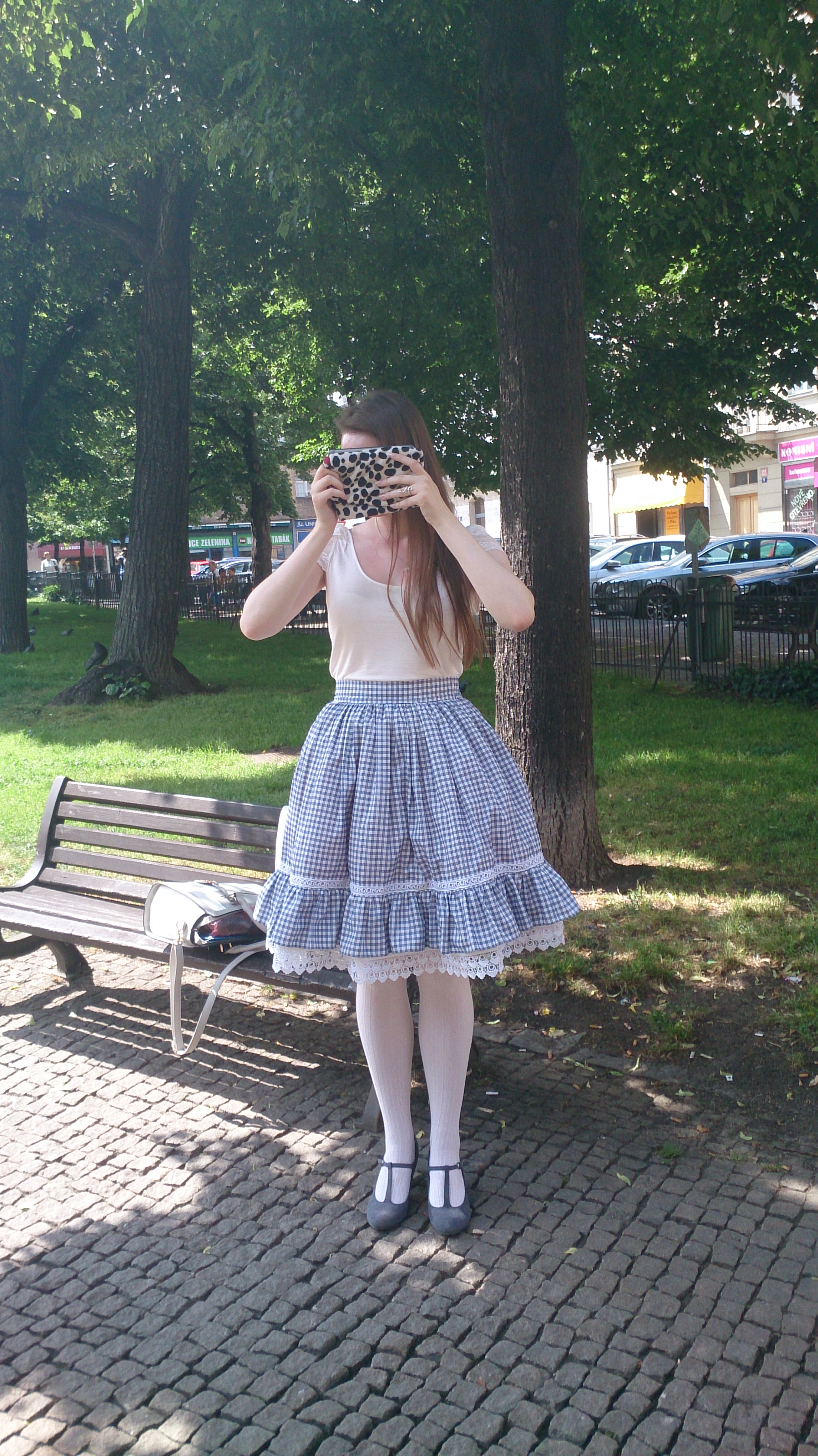 Pražská lolitka, nakonec umluvitelná na kompromisní fotografii - nejdříve byla naprosto proti focení :-D (LOKACE: Pražské Arbesovo náměstí).